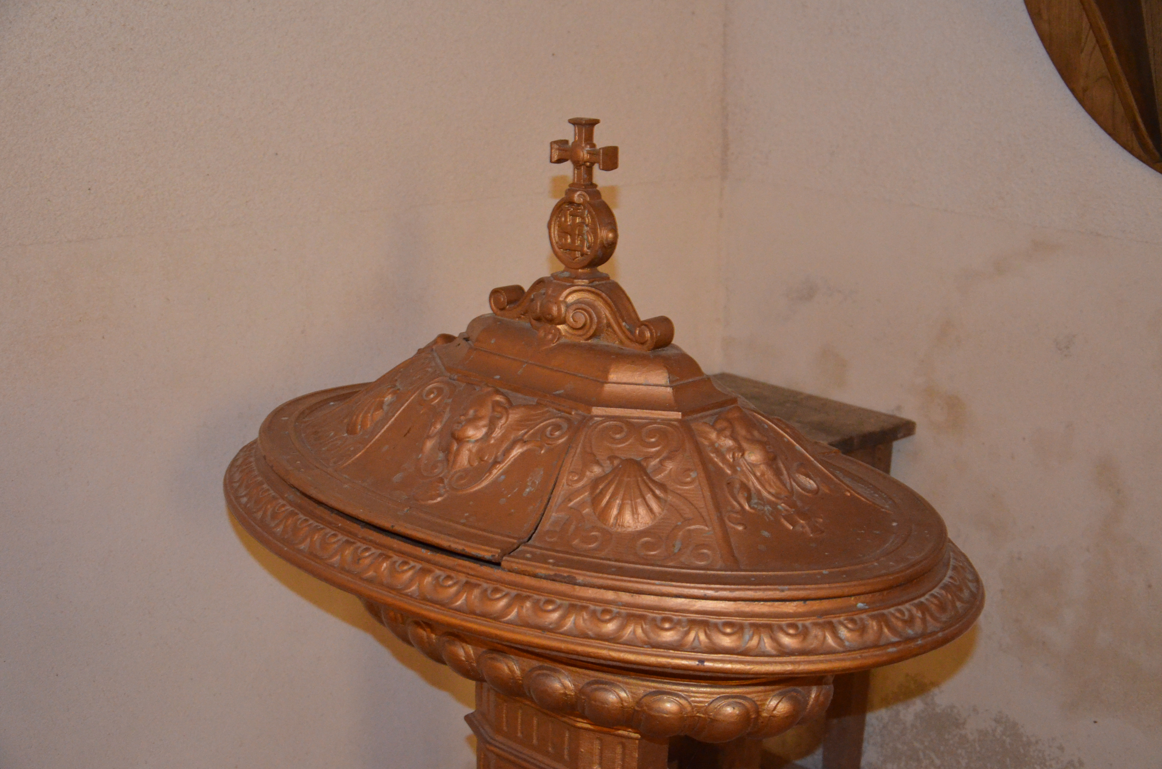 Fonts baptismaux de l'église Saint-Martin de Le Theil-Bocage, datés du XIXe siècle.